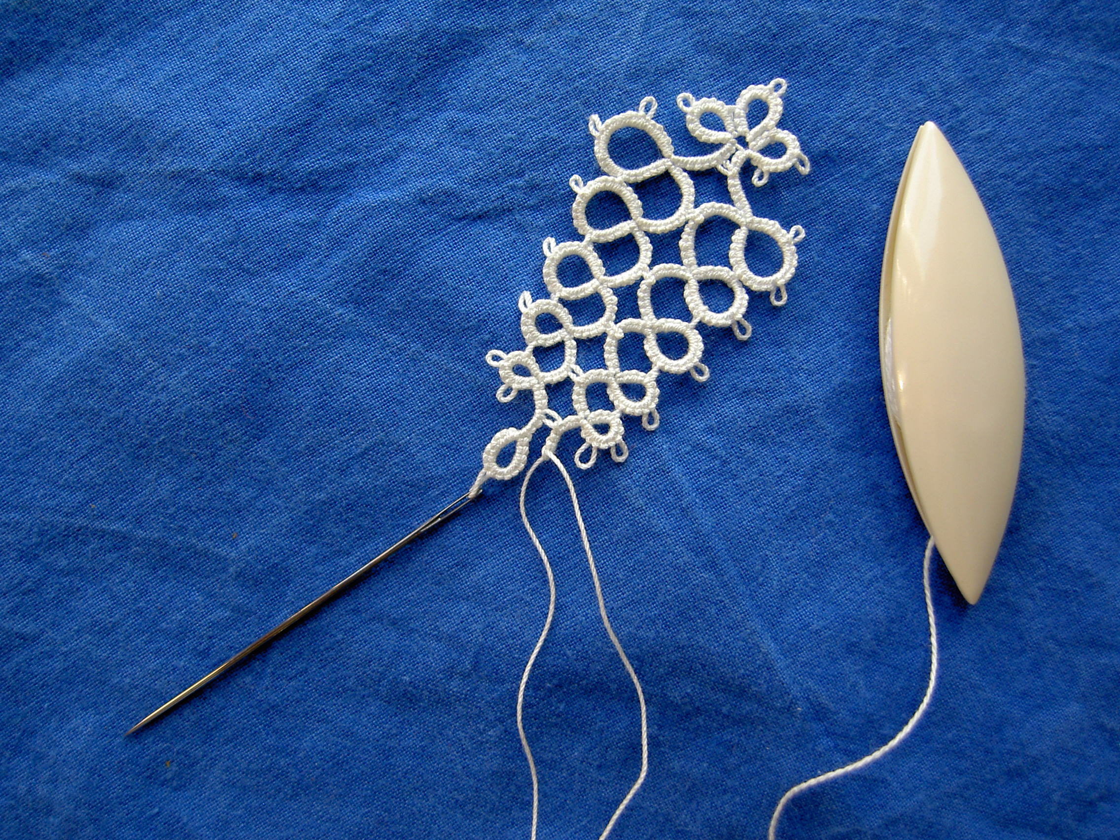 Occhi-Technik: Nähnadel als Fixierung, Garn, Schiffchen